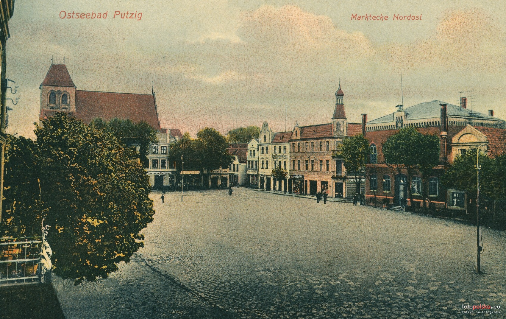 Pucki rynek